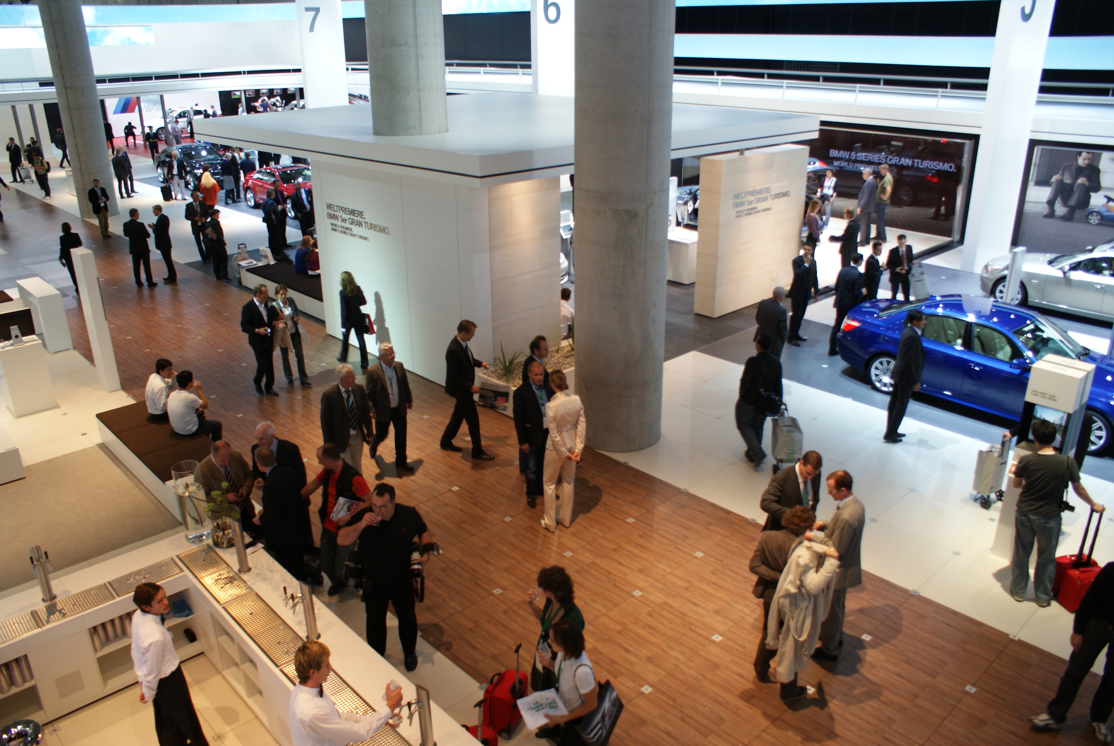 Stand BMW au Salon de Francfort 2009